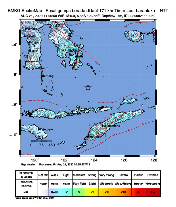 Peta guncangan gempa bumi Laut Banda 2020 dilansir dari BMKG, terasa hingga Kalimantan